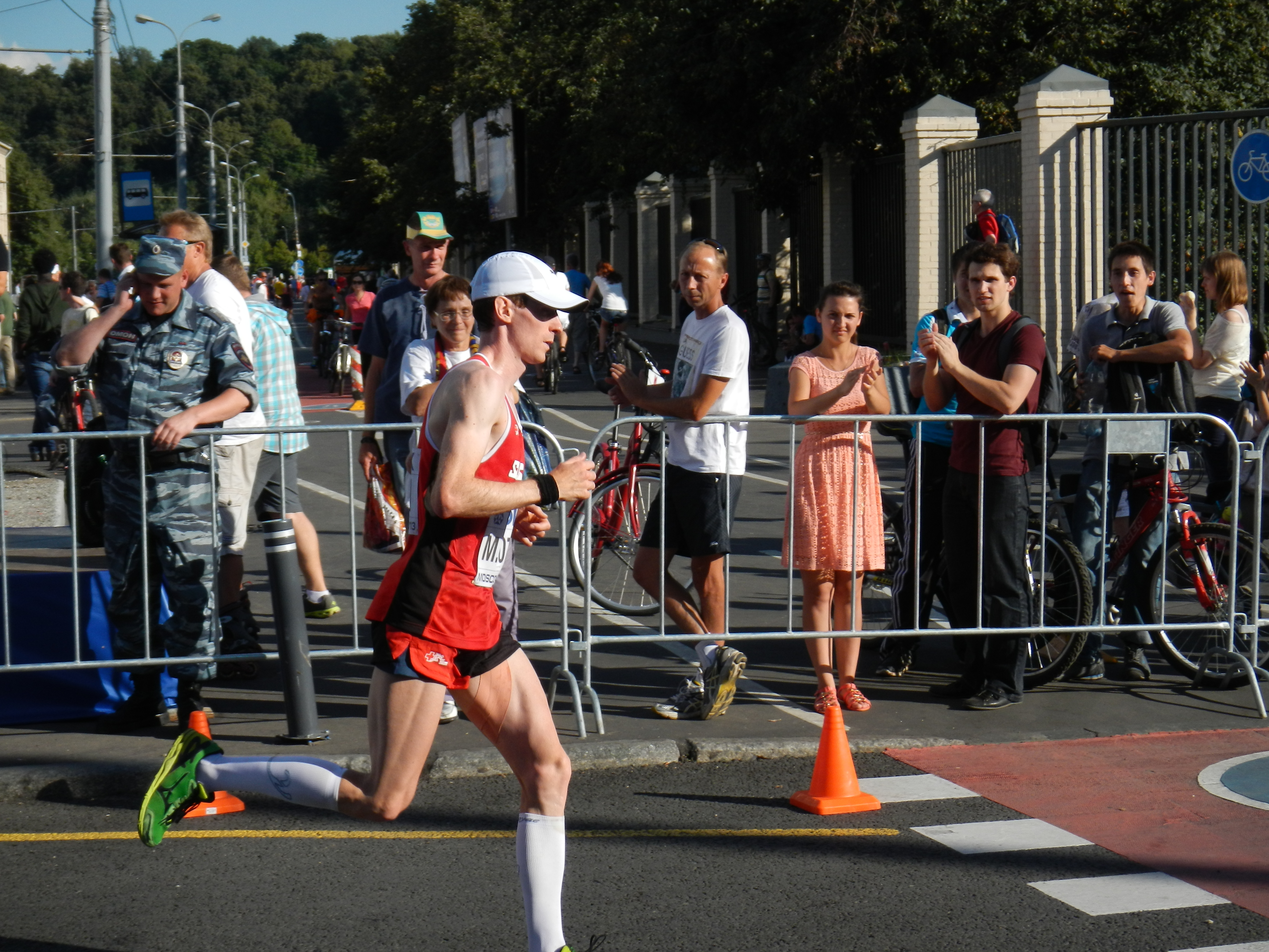 41 (1011) Michael Ott (Switzerland) 2:26:02